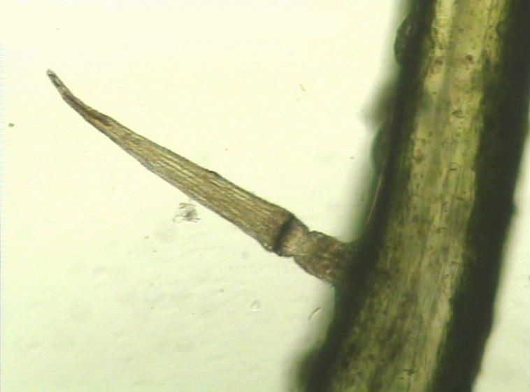 Mikroskopaufnahme des Fangblatts von Dionaea musciplua - die Ausloeseborste